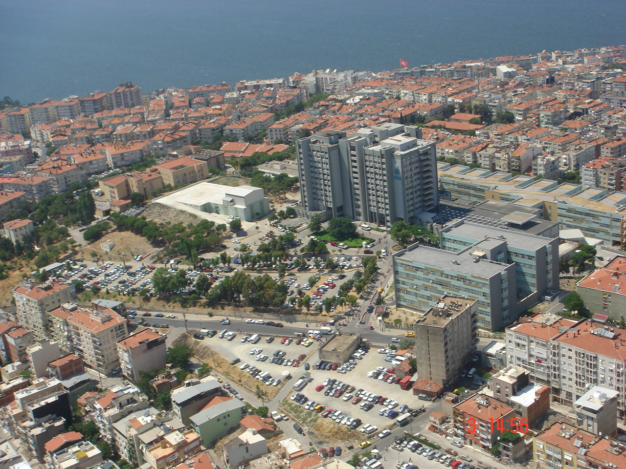 İzmir Kâtip Çelebi Üniversitesi izmir atatürk eğitim ve araştırma hastanesi